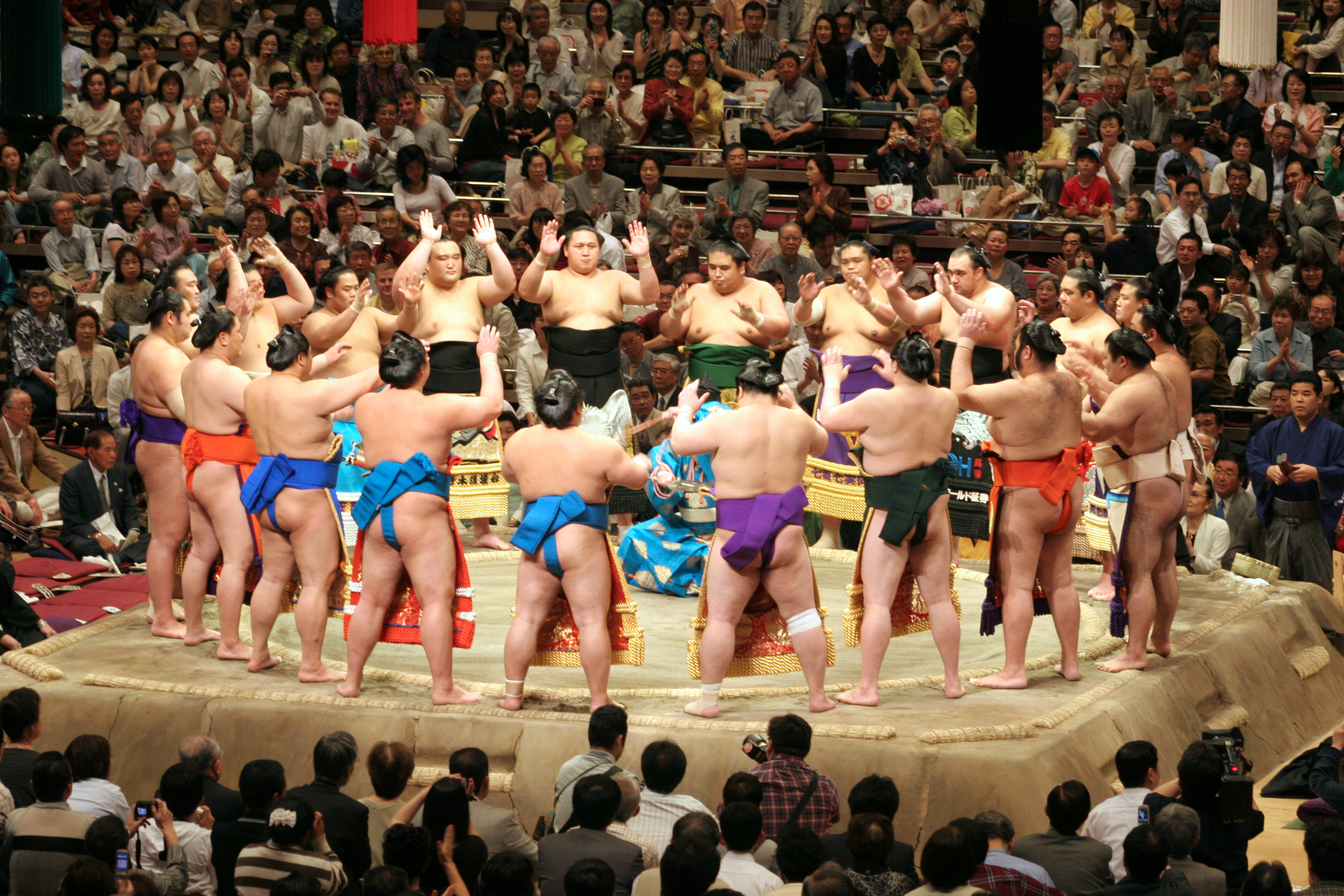 japon, tokyo, les sumo avant le combat